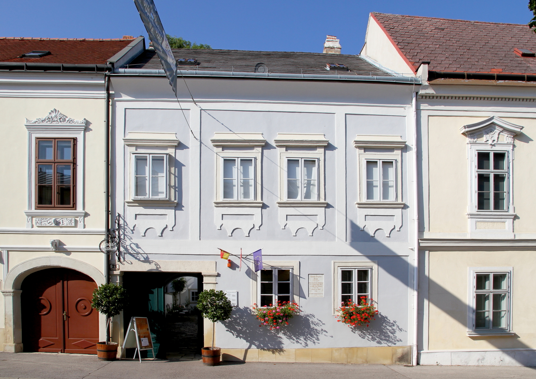 Das denkmalgeschützte Haydnhaus, Joseph Haydn-Gasse 21, in der burgenländischen Stadt Eisenstadt.